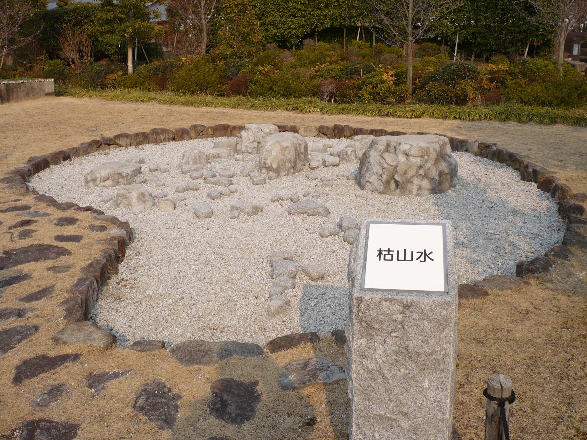 池田城の枯山水跡